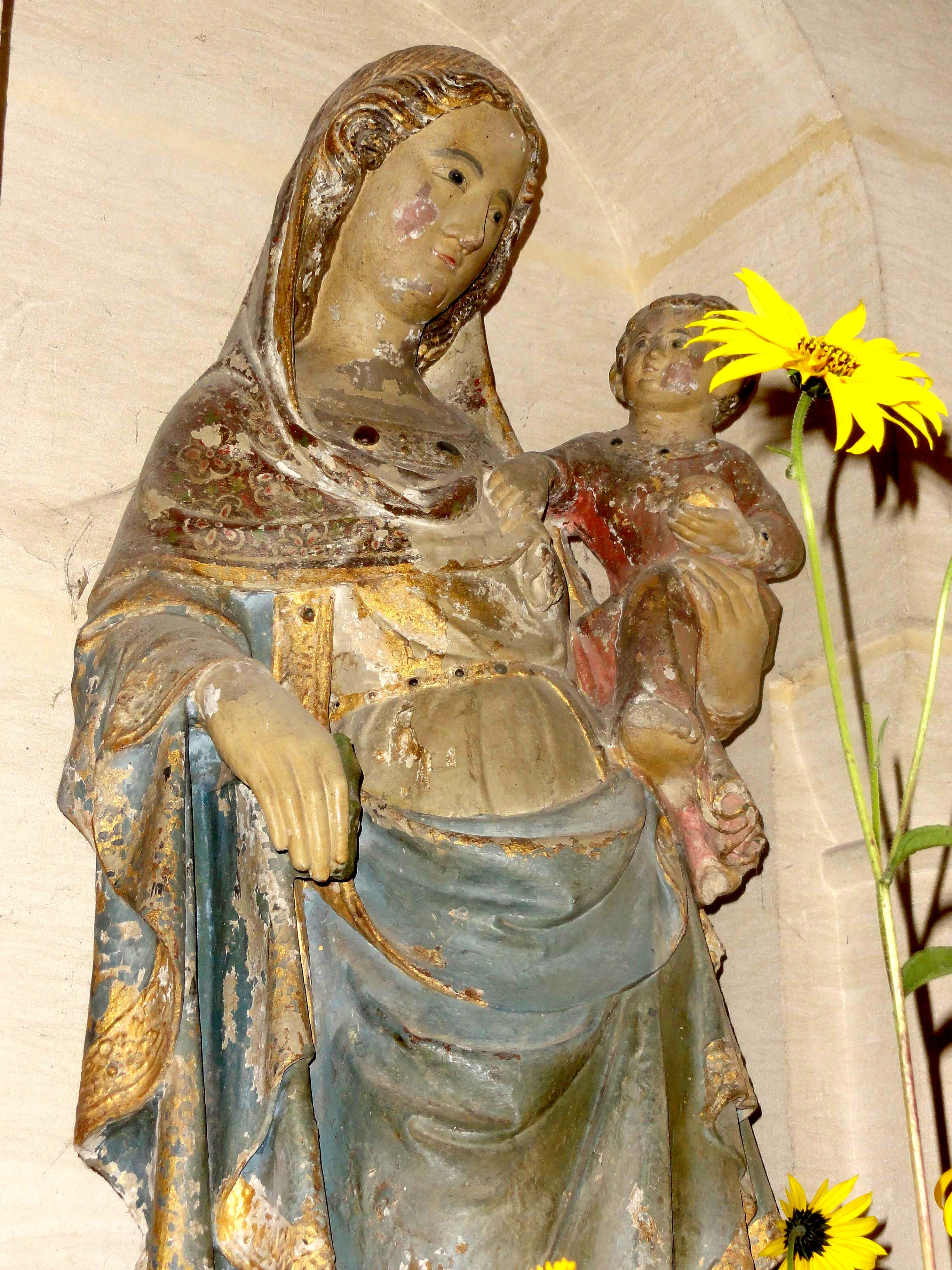 Vierge à l'Enfant en pierre calcaire polychrome, second quart XIVe siècle, vue rapprochée.